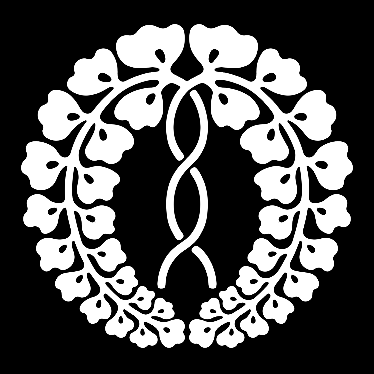 「九条藤」紋（染抜）